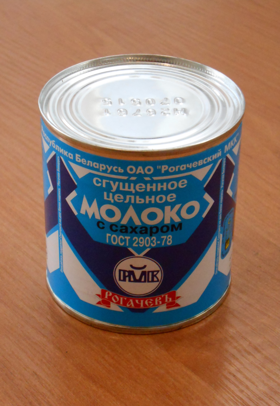 Сгущёнка Рогачевского молочноконсервного комбината в Тирасполе. Масса нетто 380 грамм. Массовая доля жира 8,5%. Сайт завода.